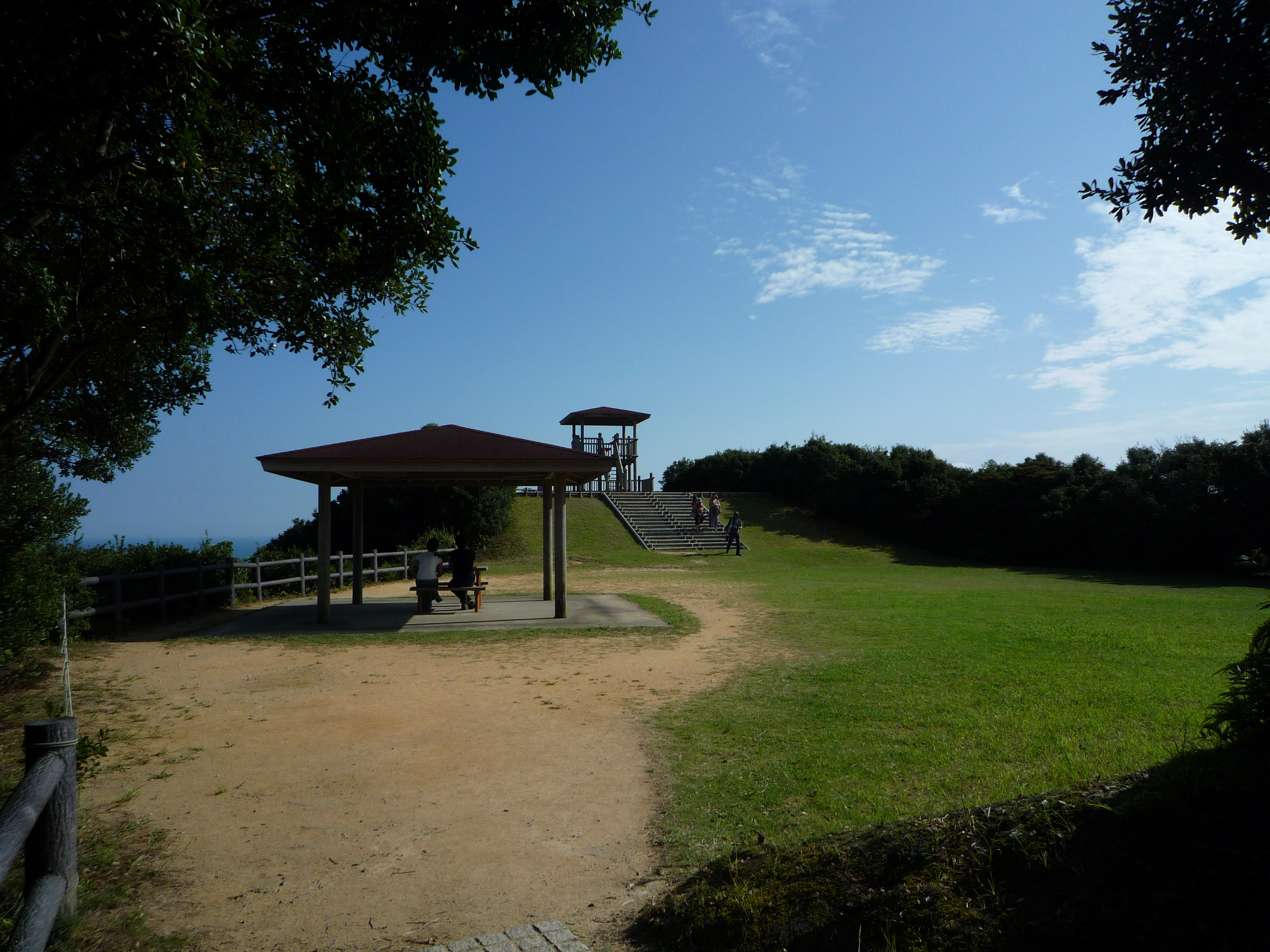 パールロードの鳥羽展望台で撮影